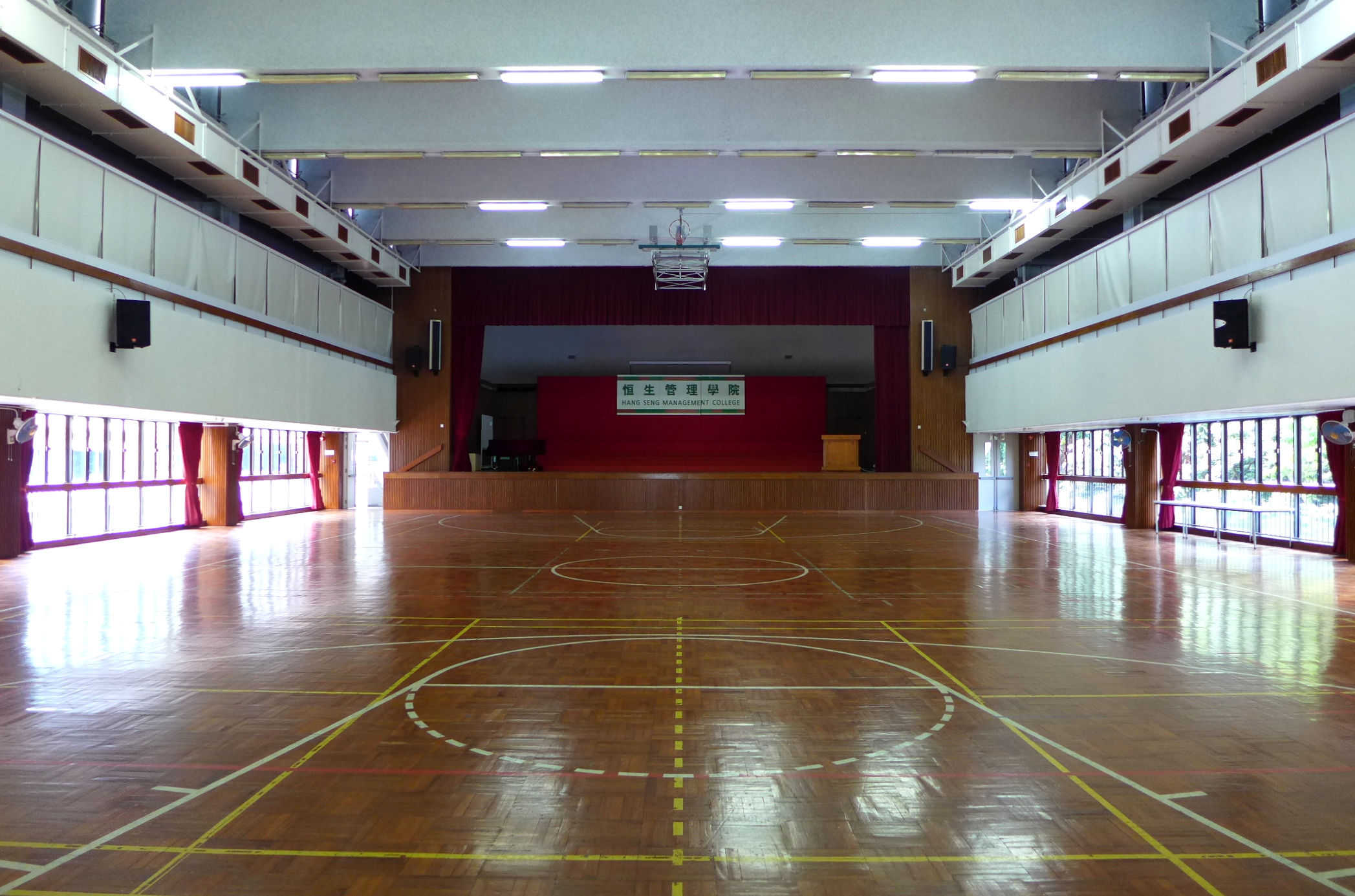 Hang Seng Management College Hall